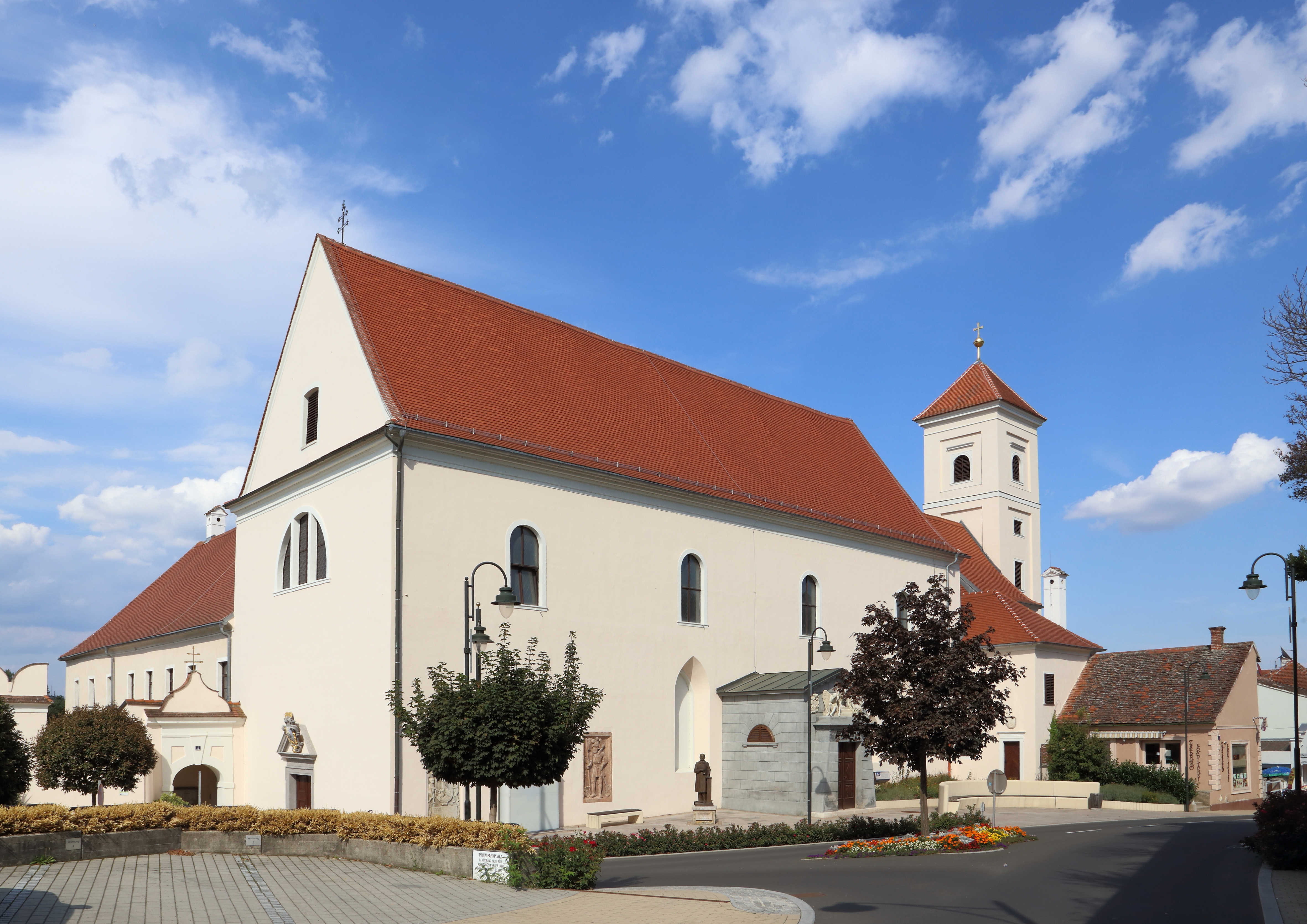 Südwestansicht der Klosterkirche Mariae Heimsuchung in der burgenländischen Bezirkshauptstadt Güssing. Unter der Kirche befindet sich die Batthyanische Familiengruft mit rund 100 Särgen.